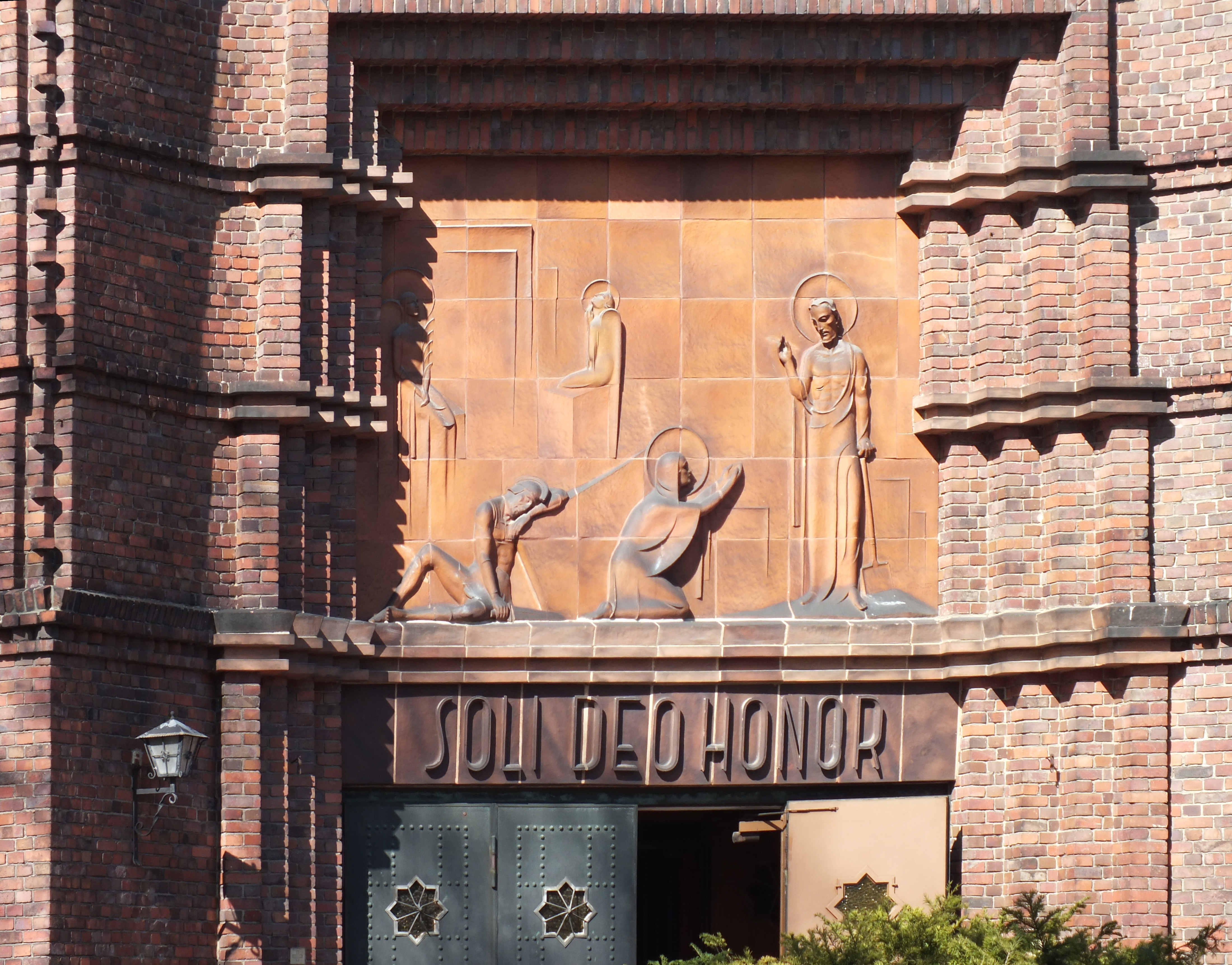 Kirche Maria Magdalena, Berlin-Niederschönhausen: Tympanon